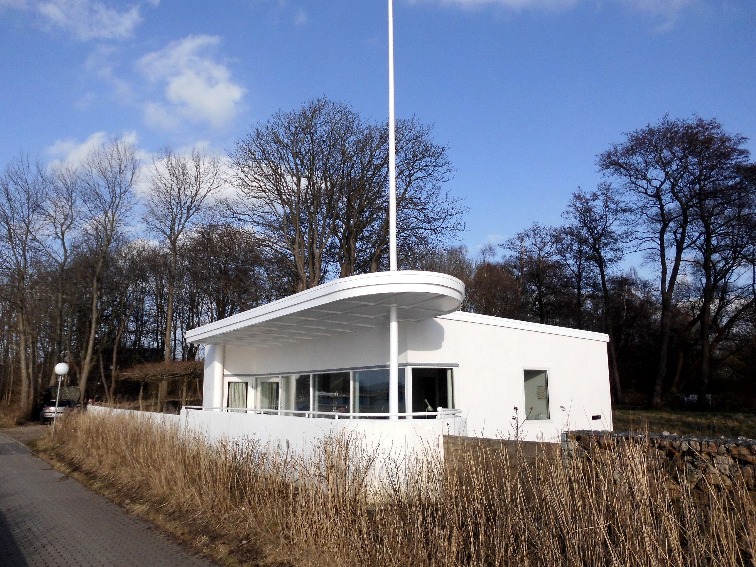 "Strandhaus Schroeder" in Heikendorf